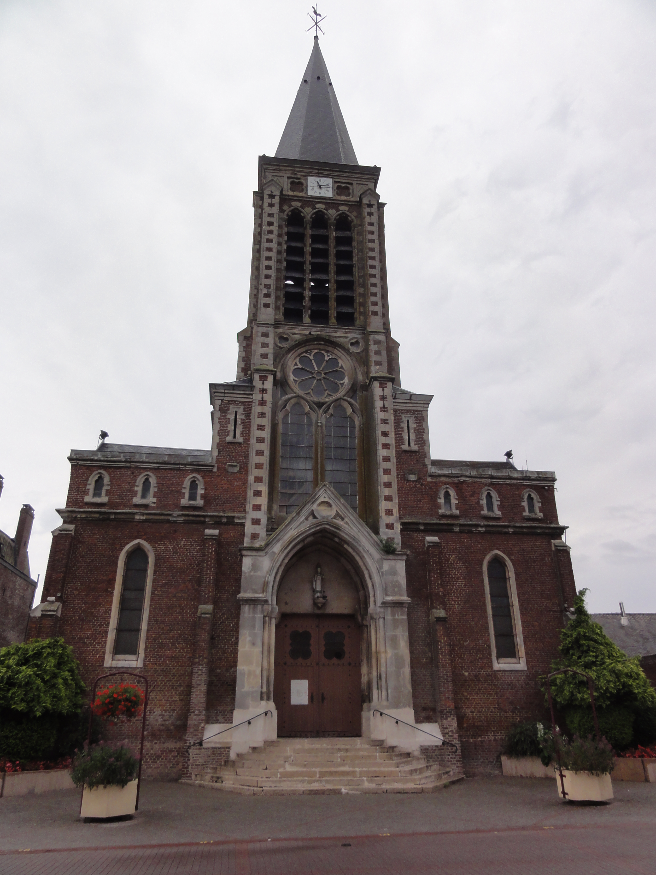 Fresnoy-le-Grand (Aisne) église